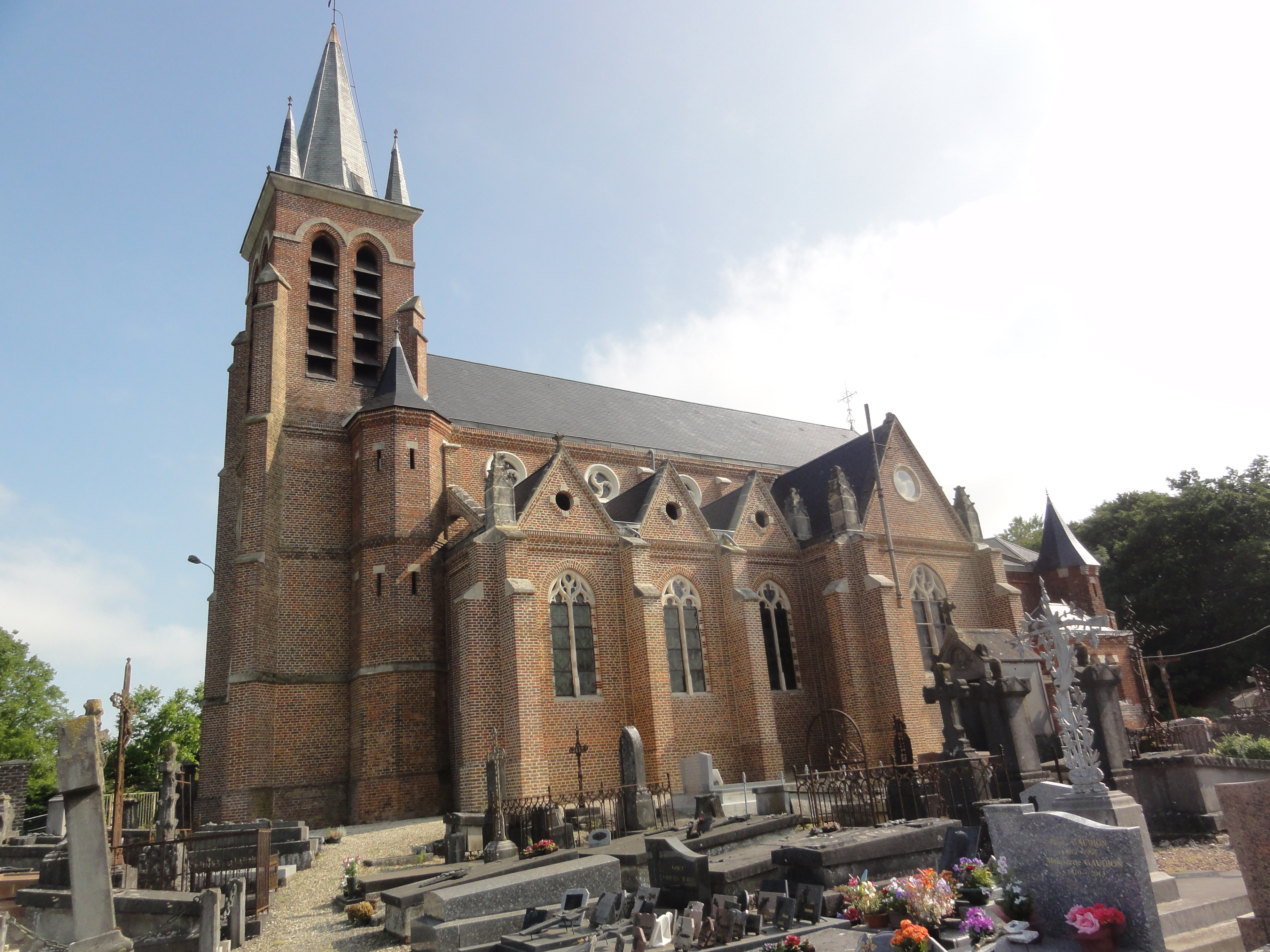 Gercy (Aisne) église